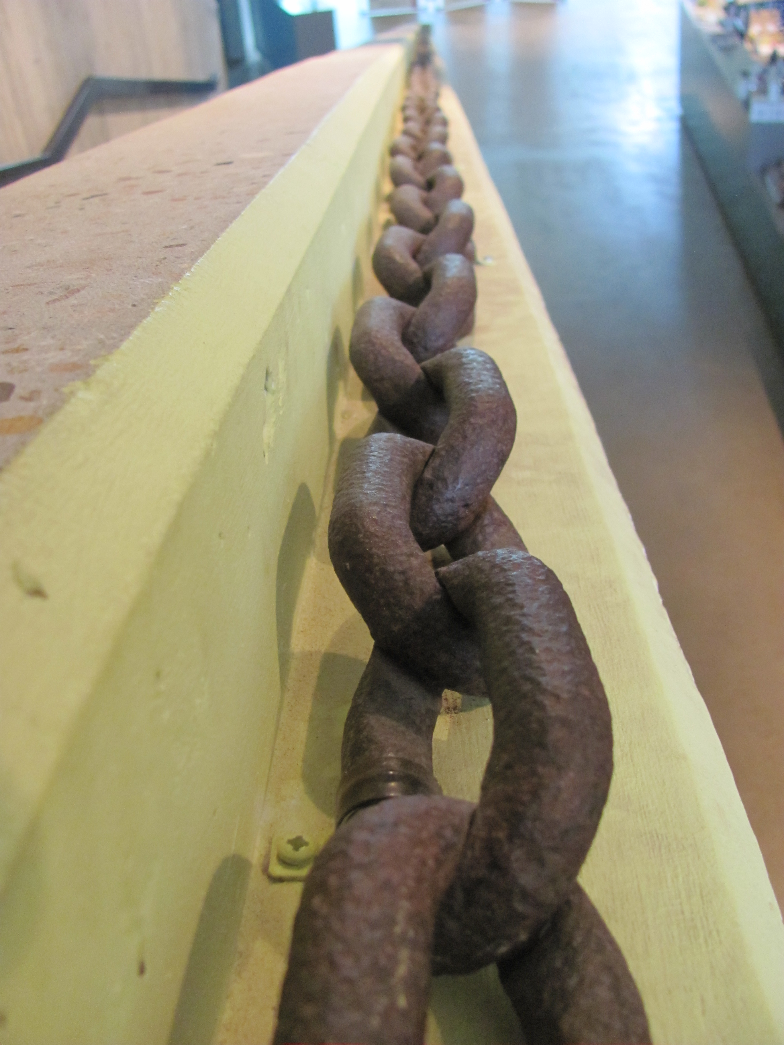 Kette der ehemaligen Kettenbahn der Grube Messel im Besucherzentrum der Welterbestätte Grube Messel